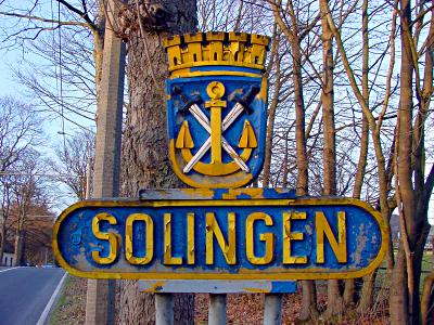 Solinger Stadtwappen - Burger Landstraße